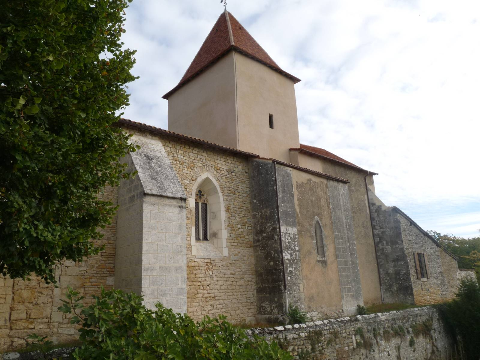 église de Beaulieu-sur-Sonnette, Charente, France